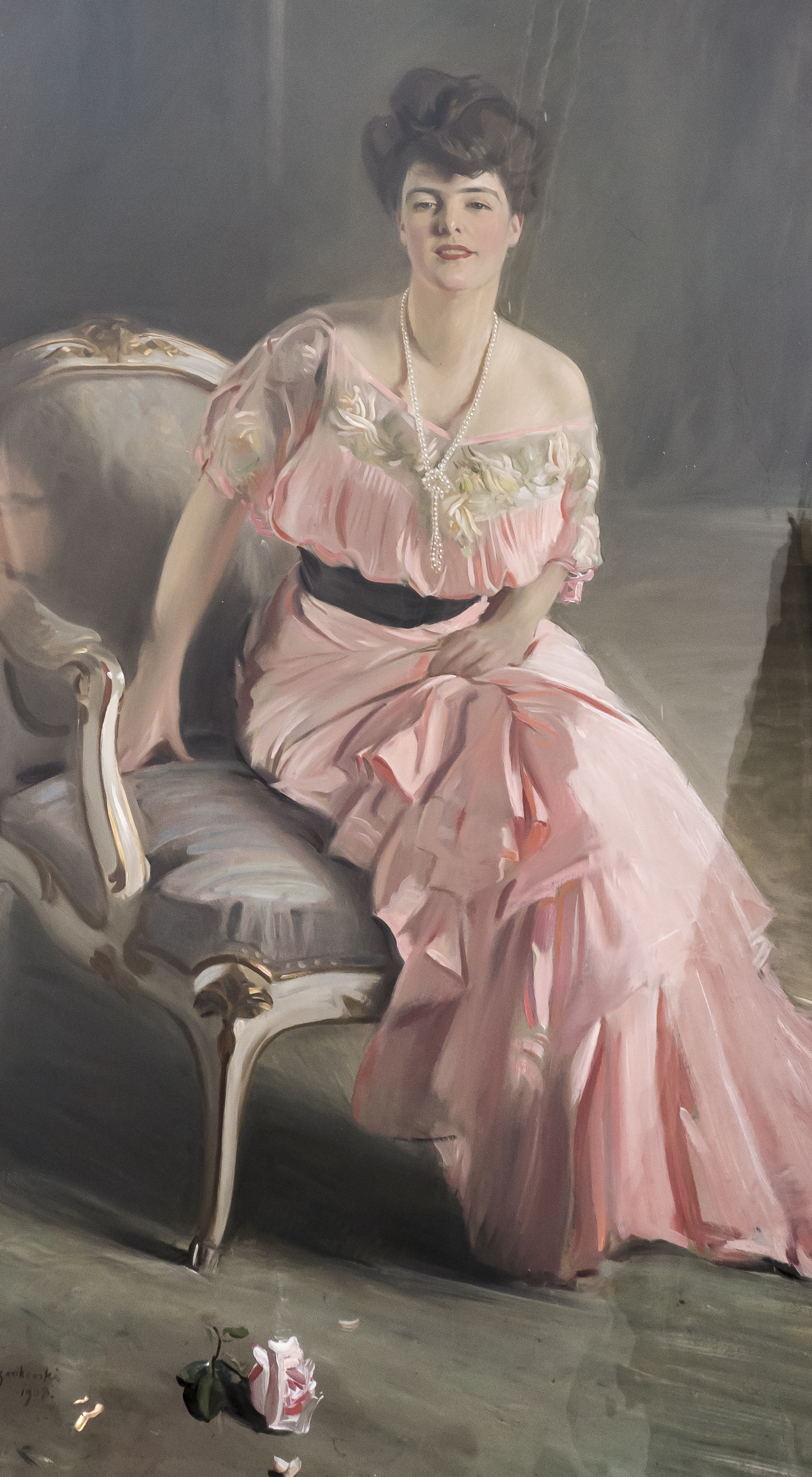 Schloss Jegenstorf Gemälde